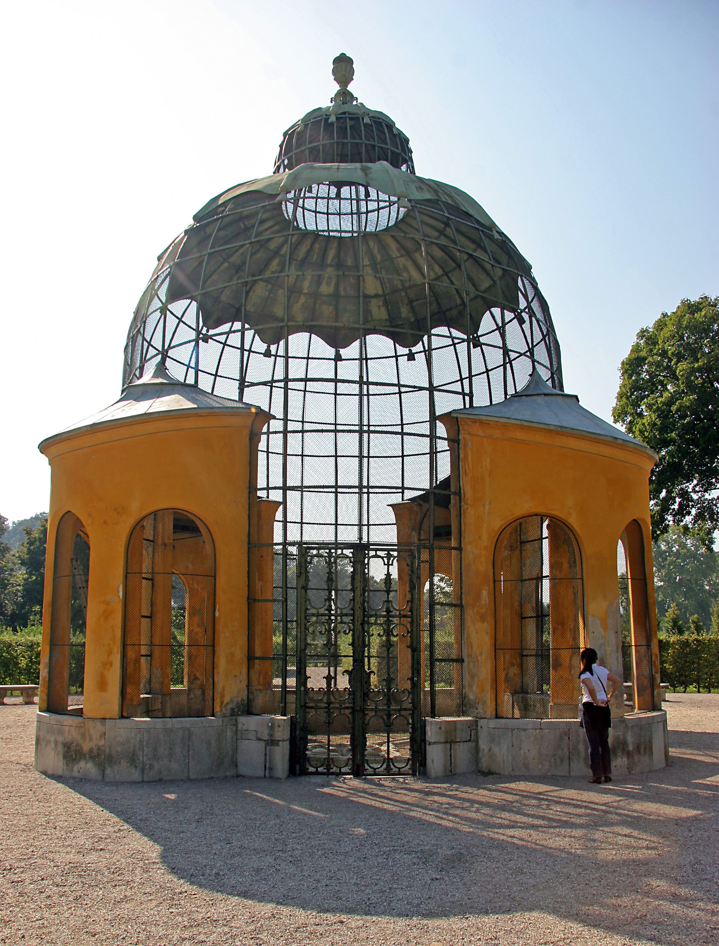 Die Voliere im Garten des Schloss Schönbrunn bei Wien, aufgenommen im September 2005.